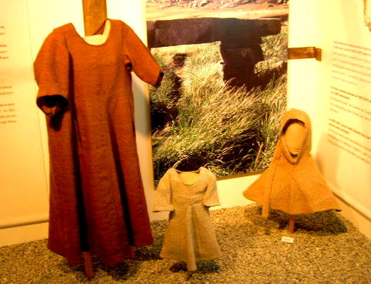 Wikinger-Kleidungsstücke (Replikate), Originale gefunden in Gräbern in Herjolfsness, heute im Grönländischen Nationalmuseum in Nuuk